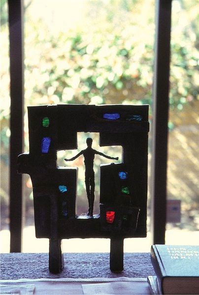 Vestervangskirken i Helsingør, Danmark. Krucifiks af Hein Heinsen